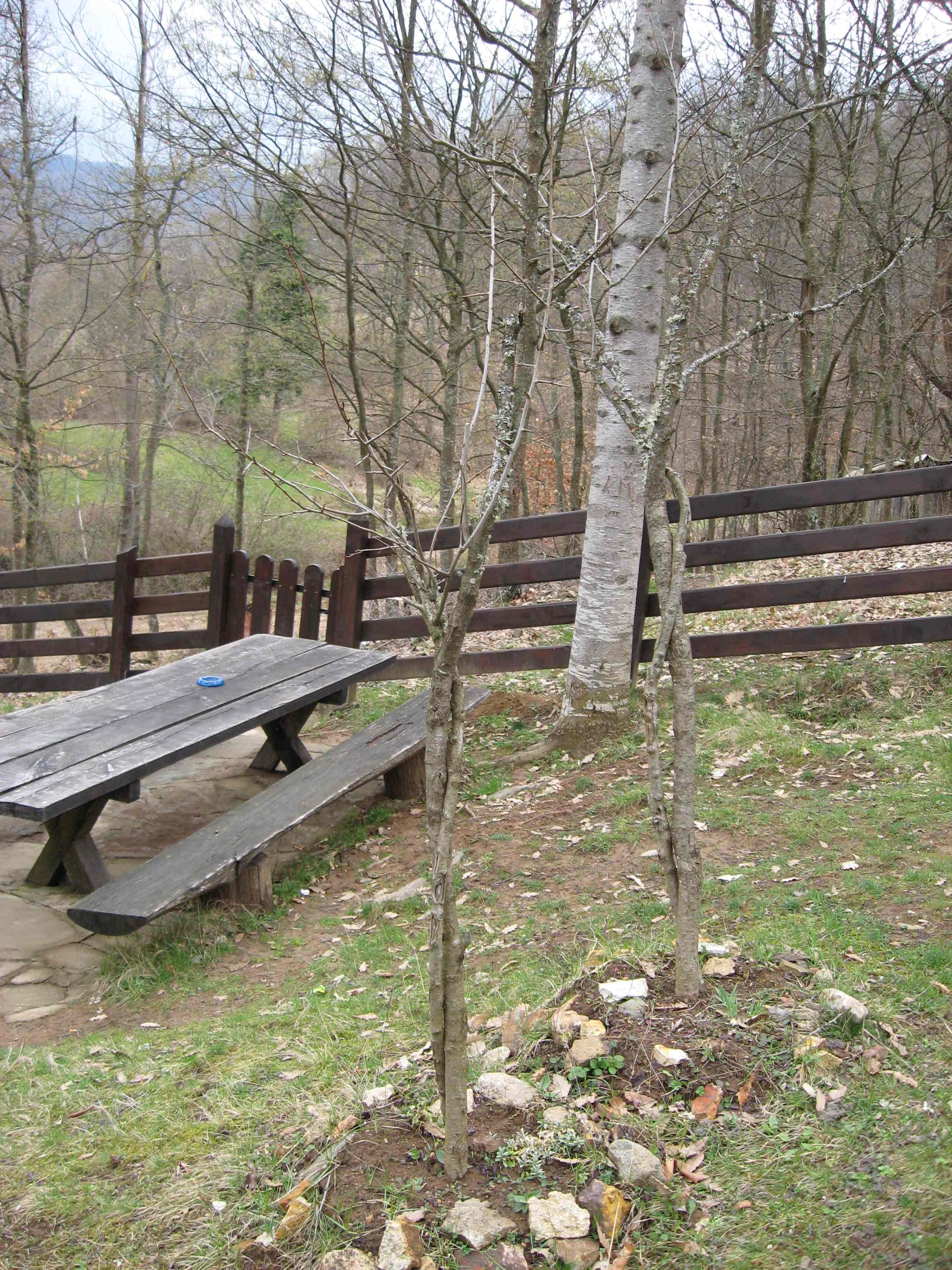 Драган Цветковић, Ниш. Црква Лазарица, Пролом Бања.